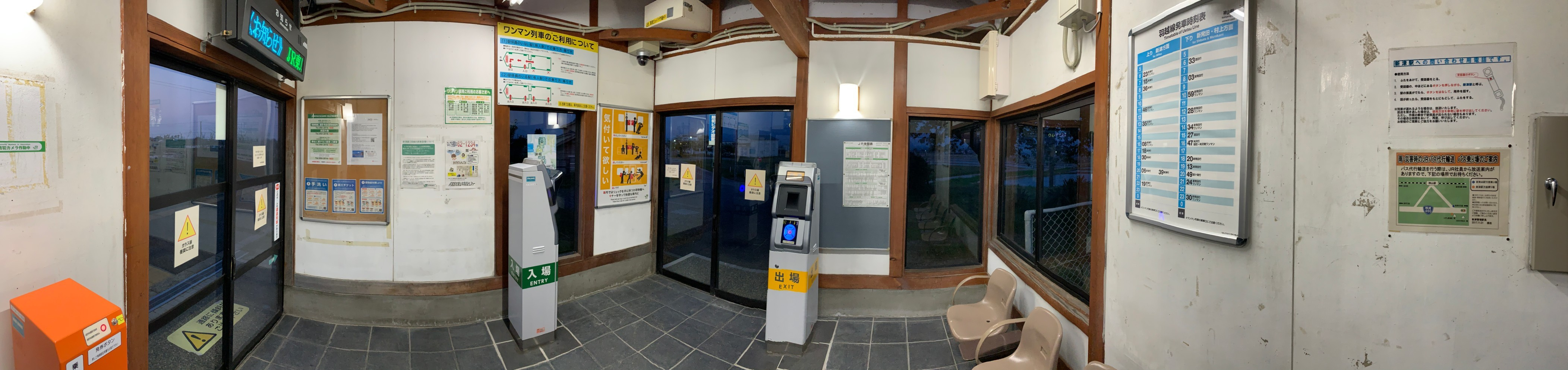 羽越本線神山駅の駅舎内（2020年5月）